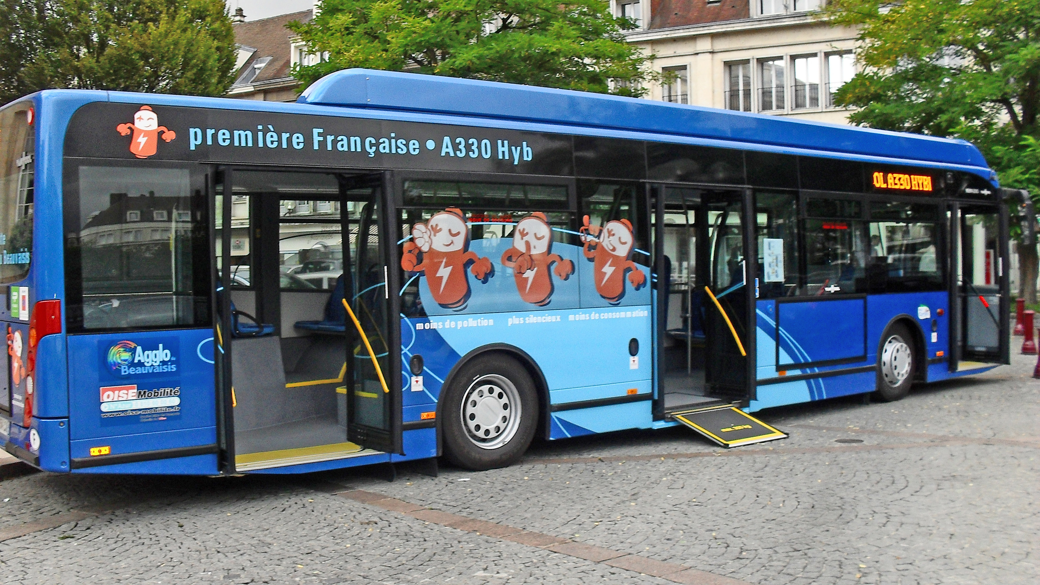 Un Van Hool A330 Hyb sur le réseau Corolis de Beauvais